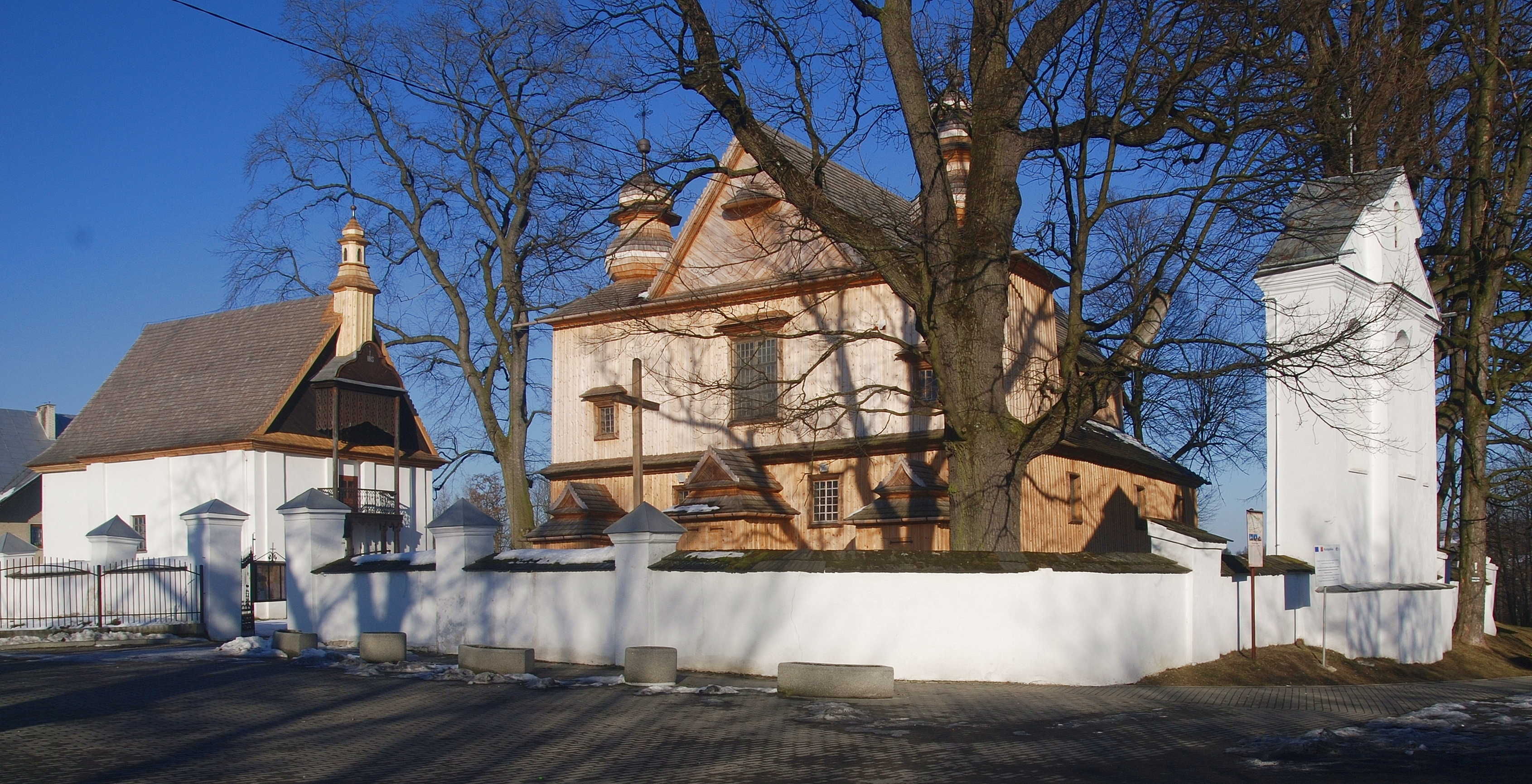 kościół